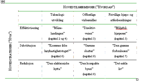 Veier til miljøvennlig transport basert på hovedstrategier og hovedtilnærminger (Kilde: Erling Holden m.fl., 2009, "Transport og miljø", Tapir Akademisk Forlag)